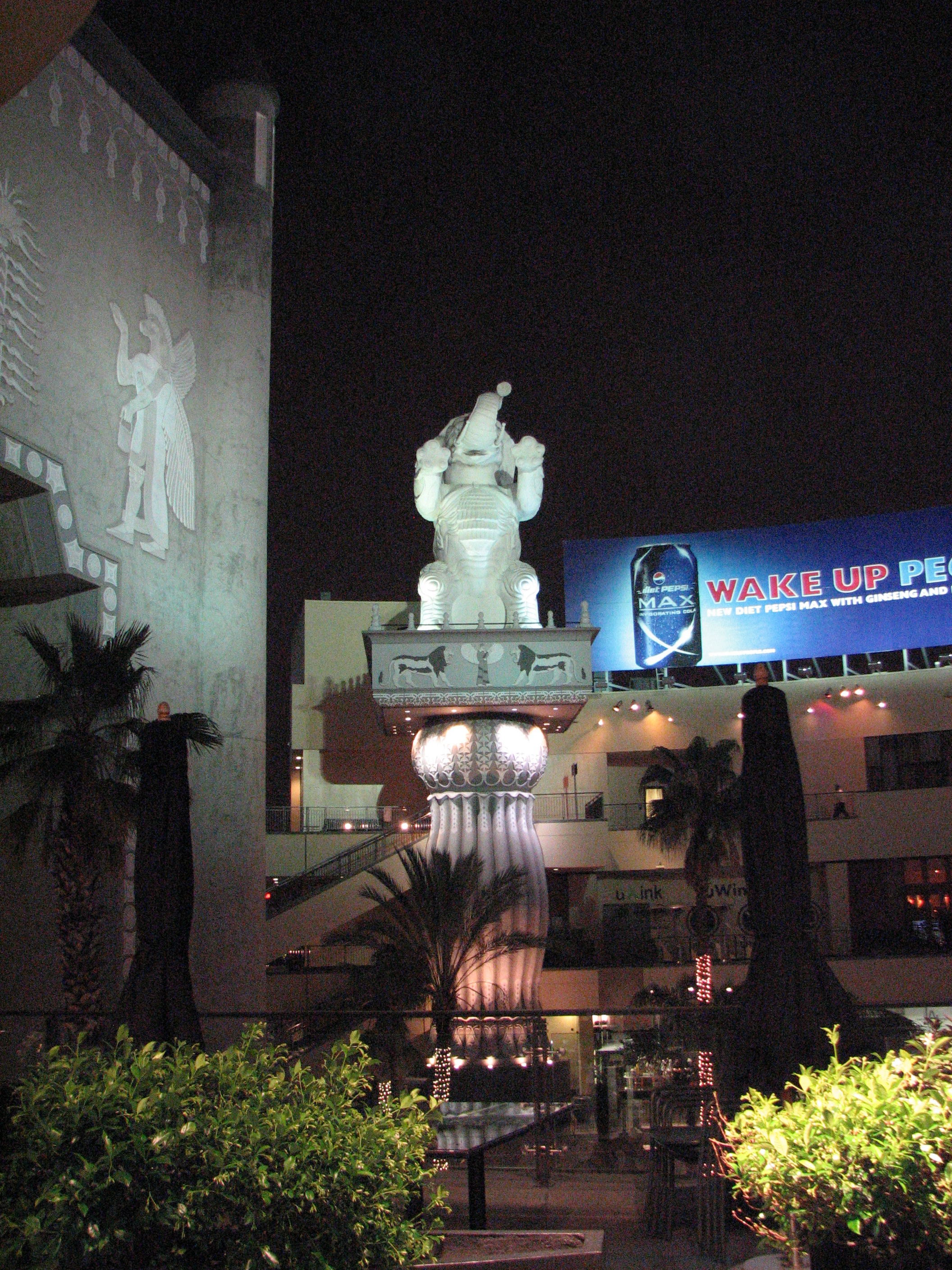 Слончето тежи деца - някъде към сто килца. 2. белият слон в анфас.